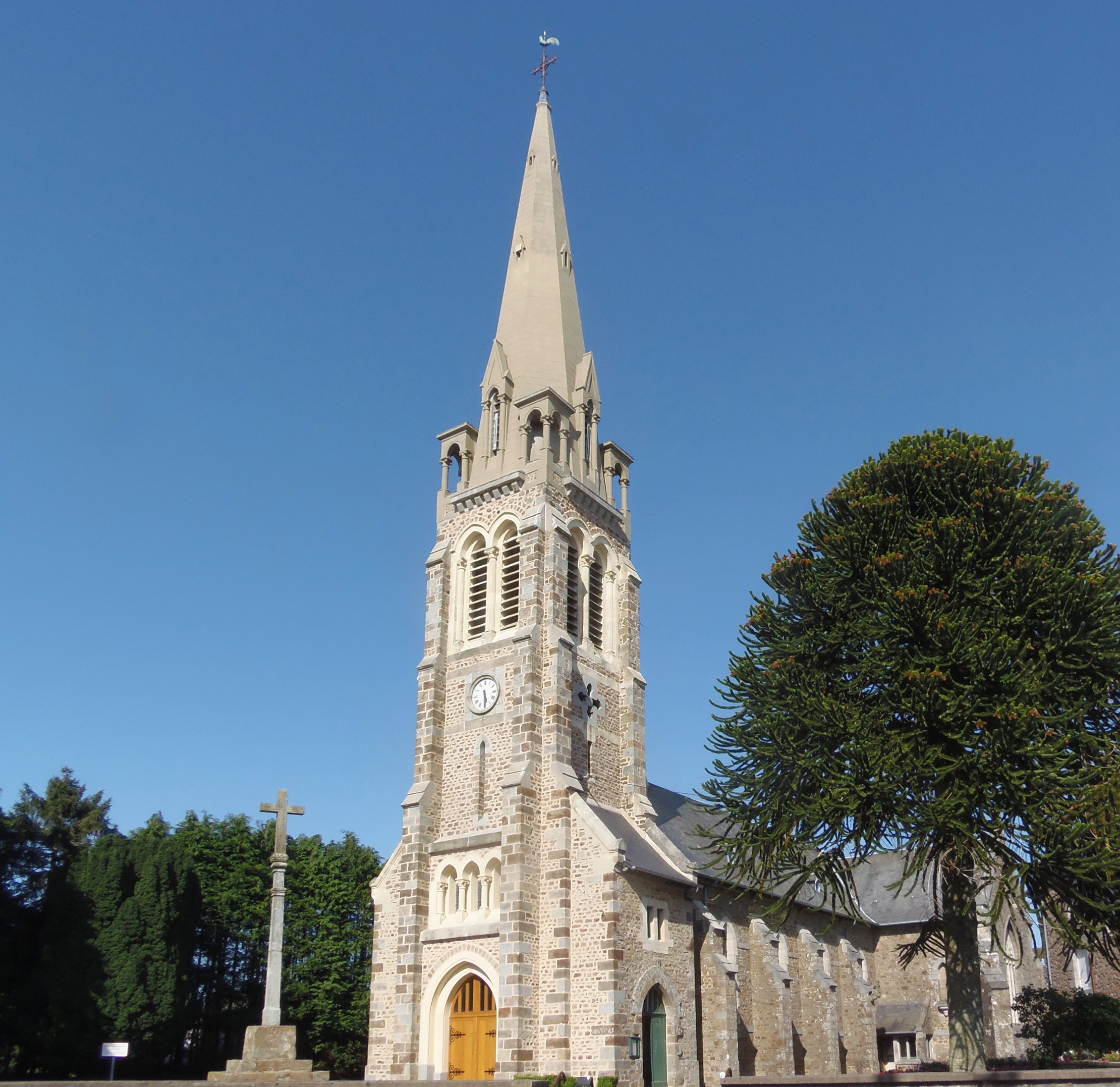 Ger (Normandie, France). L'église Saint-Matthieu.